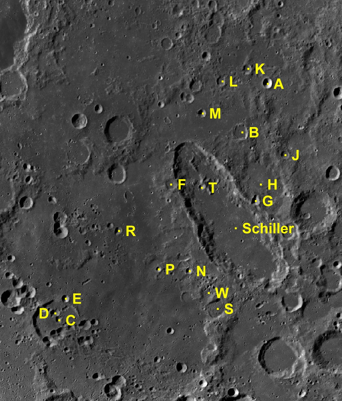 Cráter lunar Schiller. Cráteres satélite. (Imagen LRO)